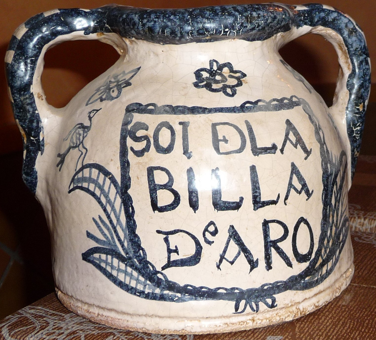 Leyenda en la decoración de un jarro de Haro. La Rioja (España)